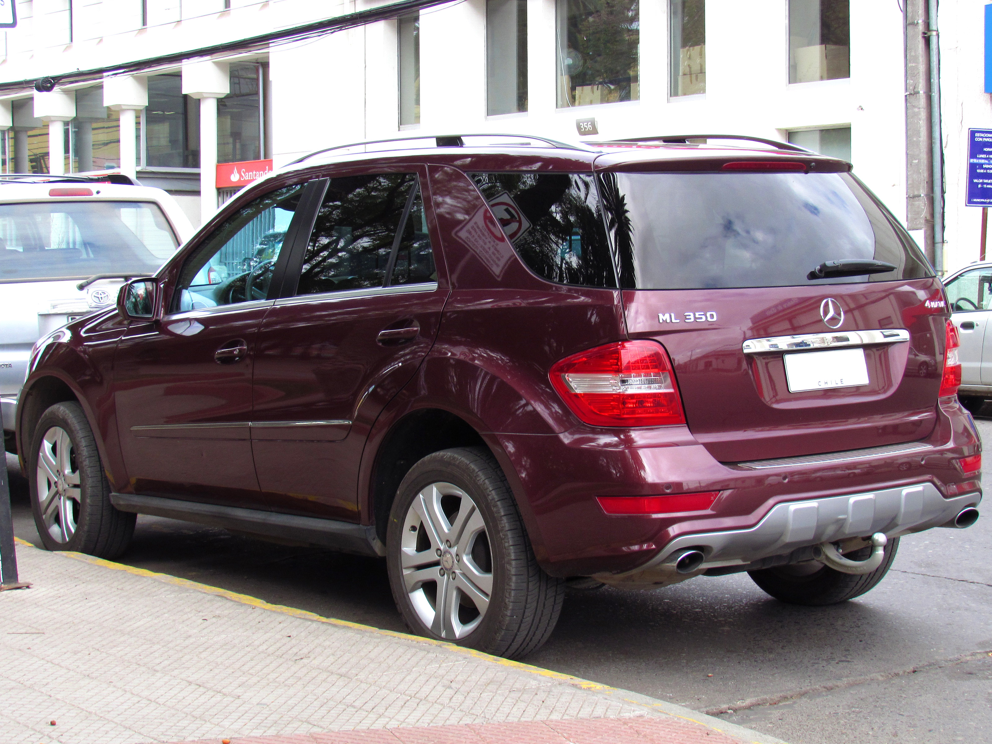 Mercedes Benz ML 350 4Matic 2010